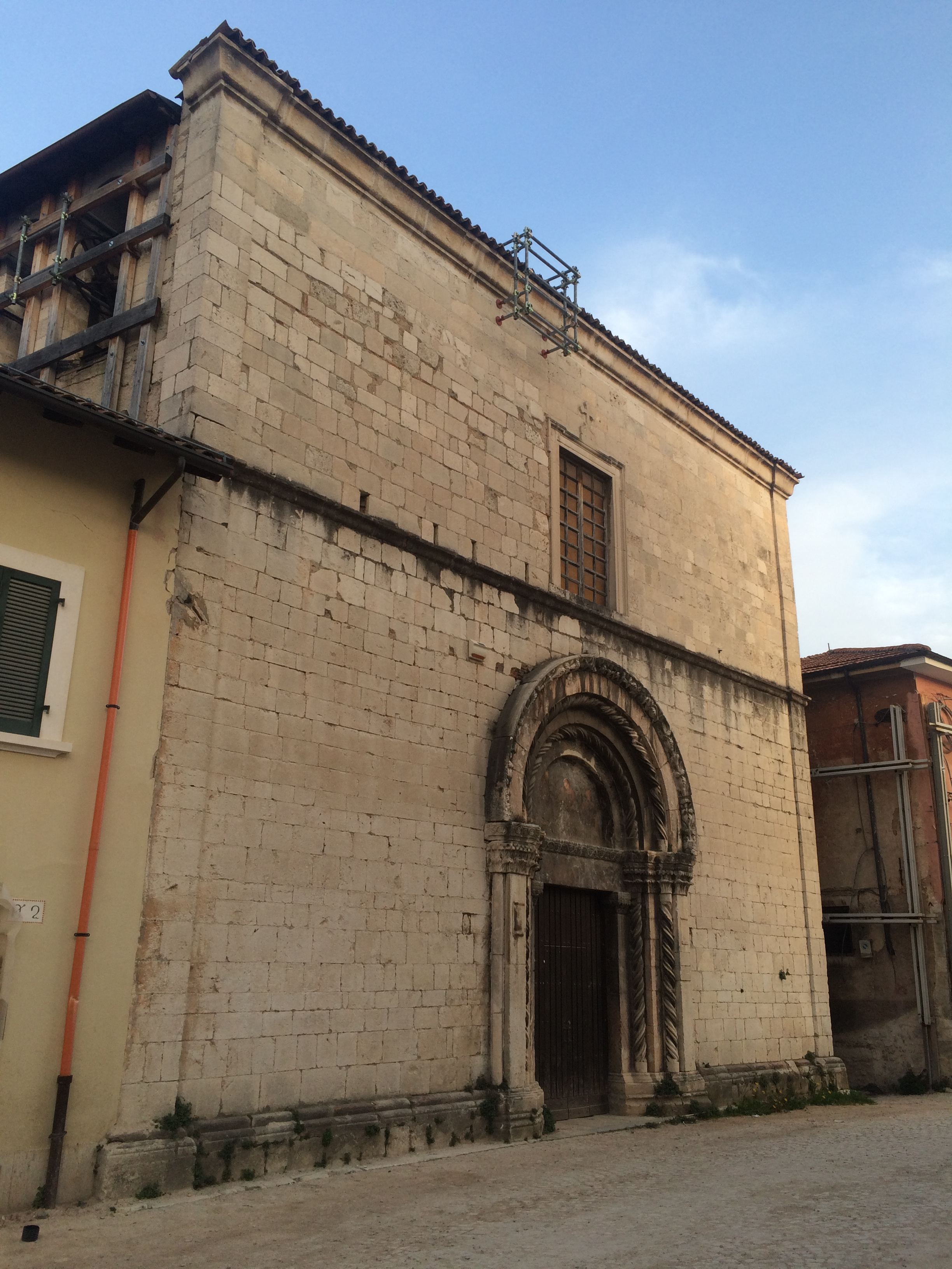 Facciata della chiesa di San Flaviano all'Aquila.